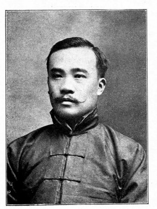 中文（台灣）: 中華民國國會議員